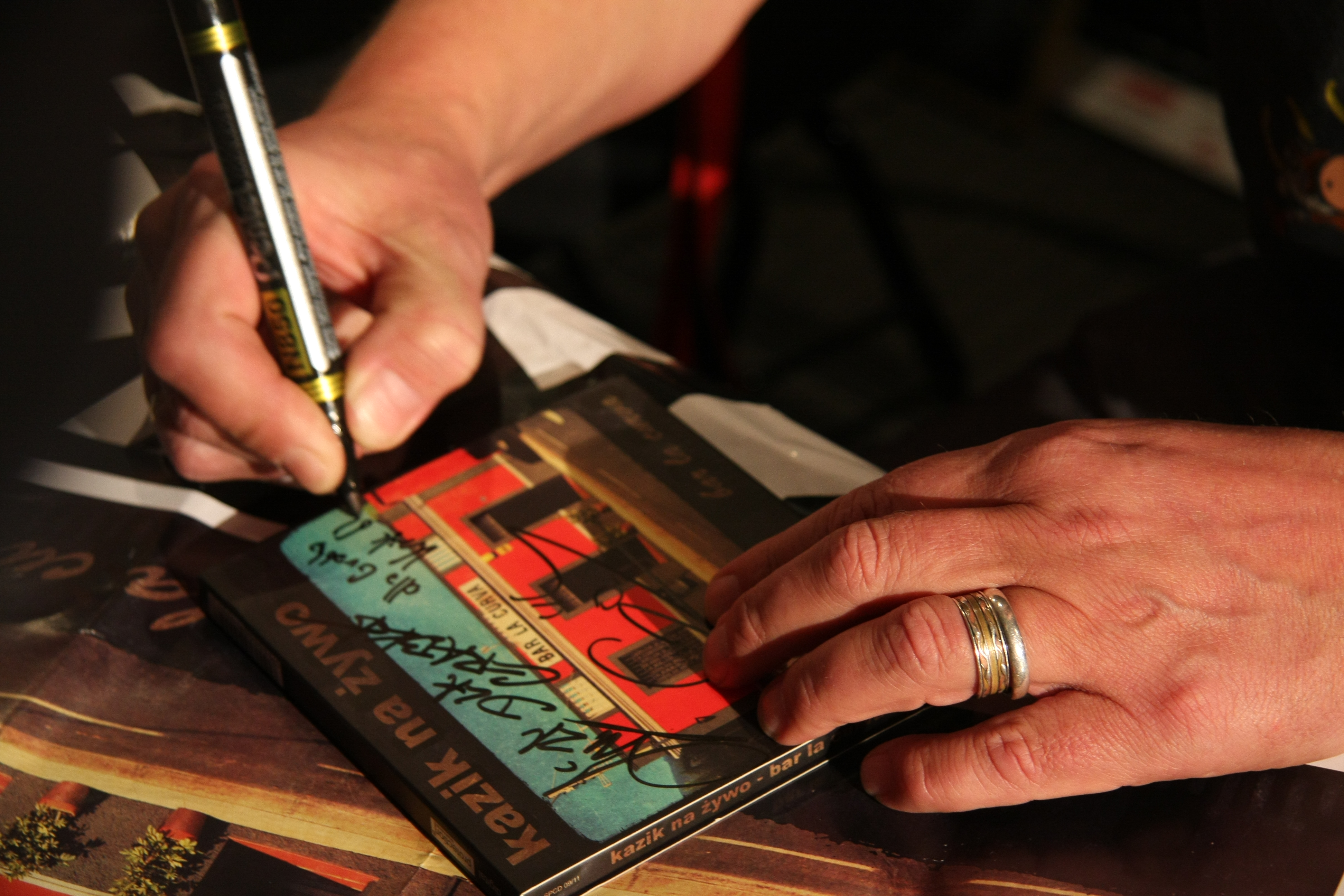 Kazik w czasie podpisywania płyty Bar La Curva / Plamy na słońcu zespołu Kazik na Żywo 5 grudnia 2011 roku w warszawaskim Teatrze Rozmaitości